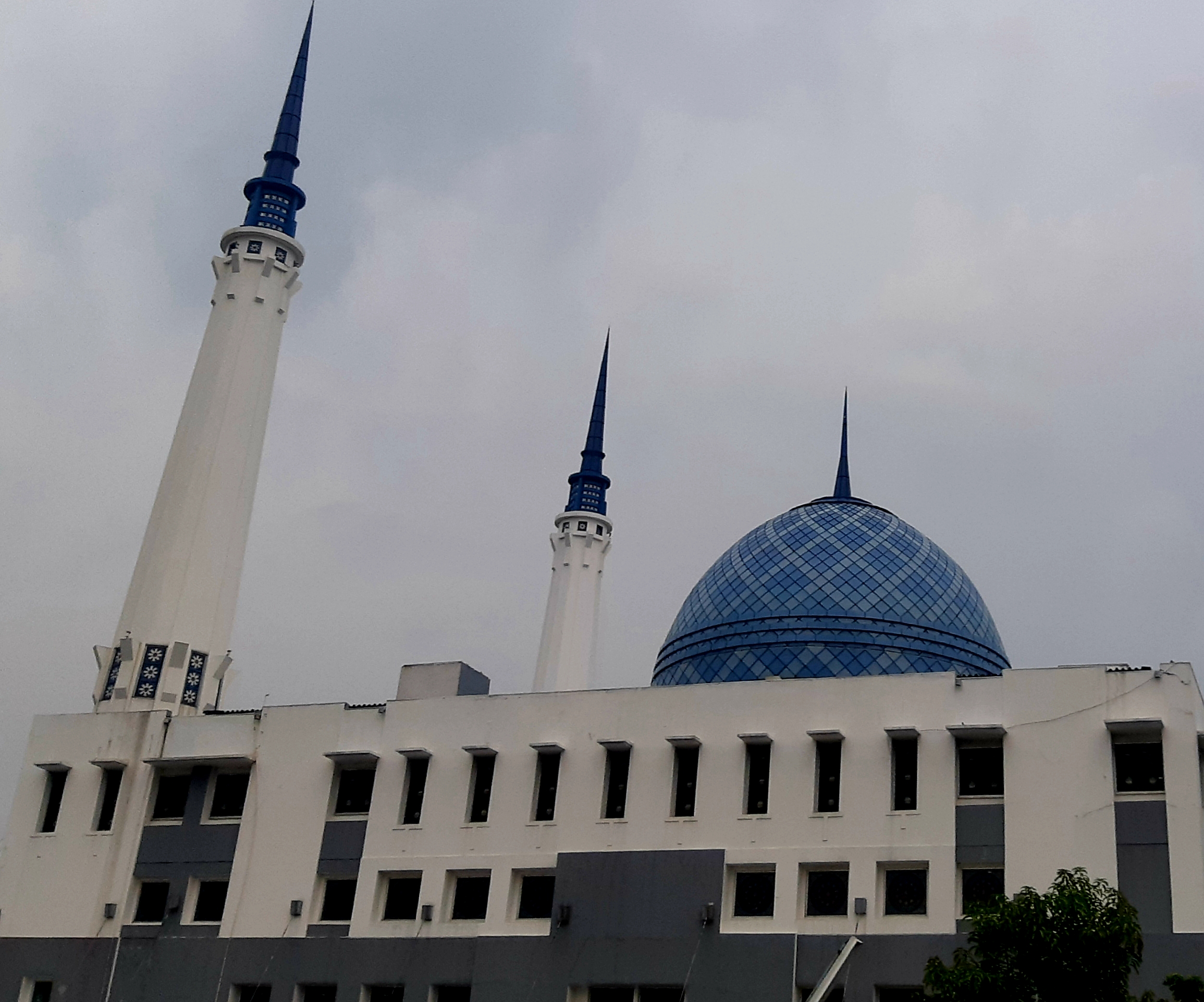 Masjid Astra